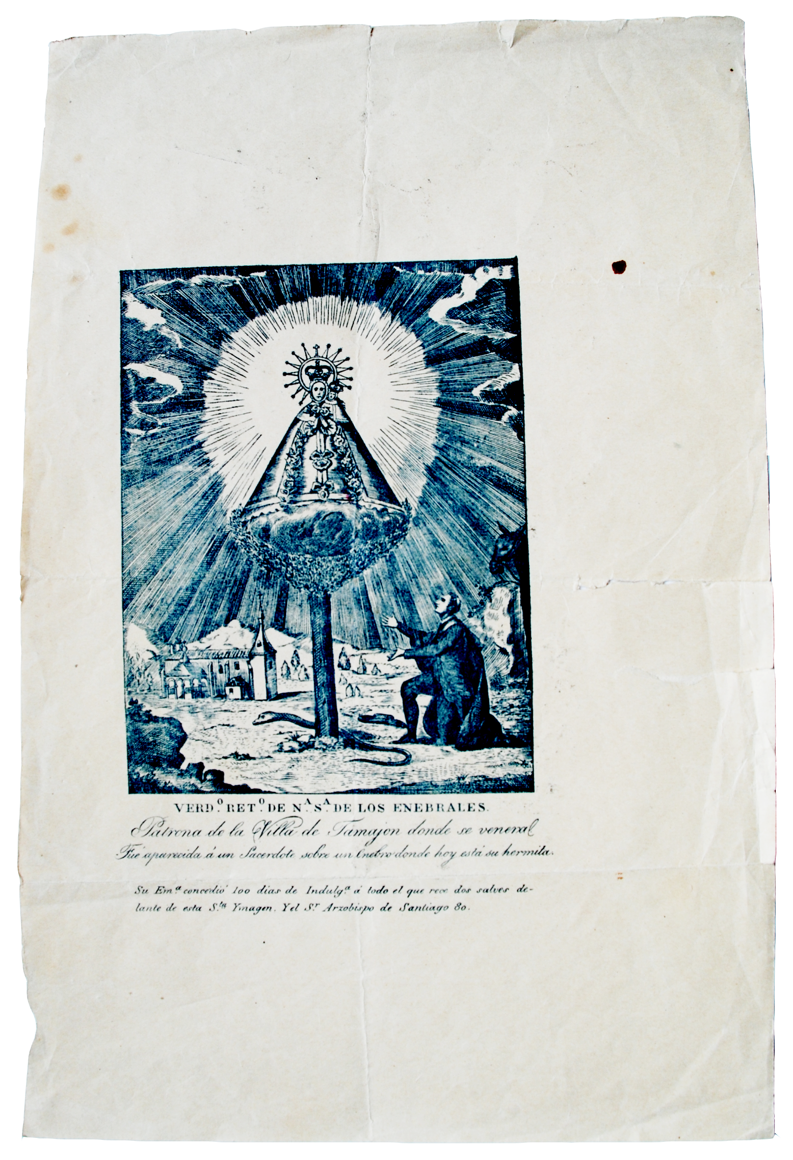 Ermita de Nuestra Sra. de los Enebrales, Tamajón (Guadalajara), Castilla-La Mancha, España, románica s. XVI. Virgen Enebrales leyenda.